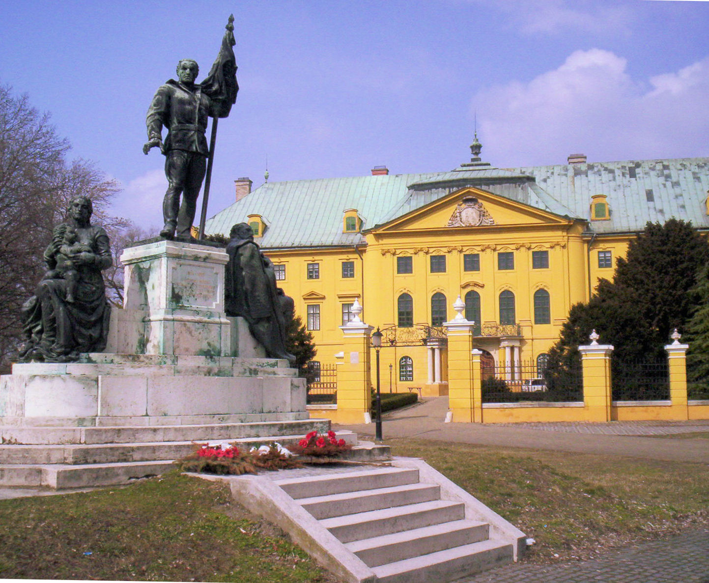 A kalocsai Érseki palota (Oswald Gáspár – 1775) és az I. világháborús Hősi emlékmű (Sidló Ferenc – 1930) – photo taken by uploader User:Csanády in 2006.